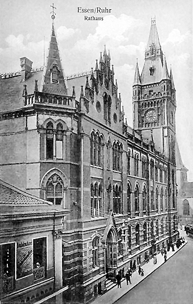 Rathaus Essen von 1888-1964